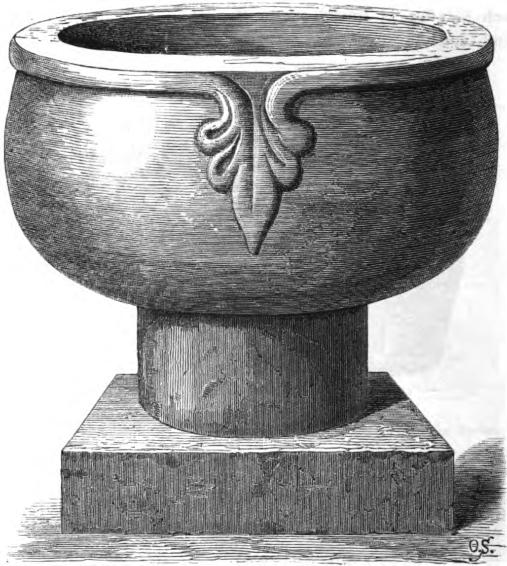 Tuve kyrka. Dopfunt